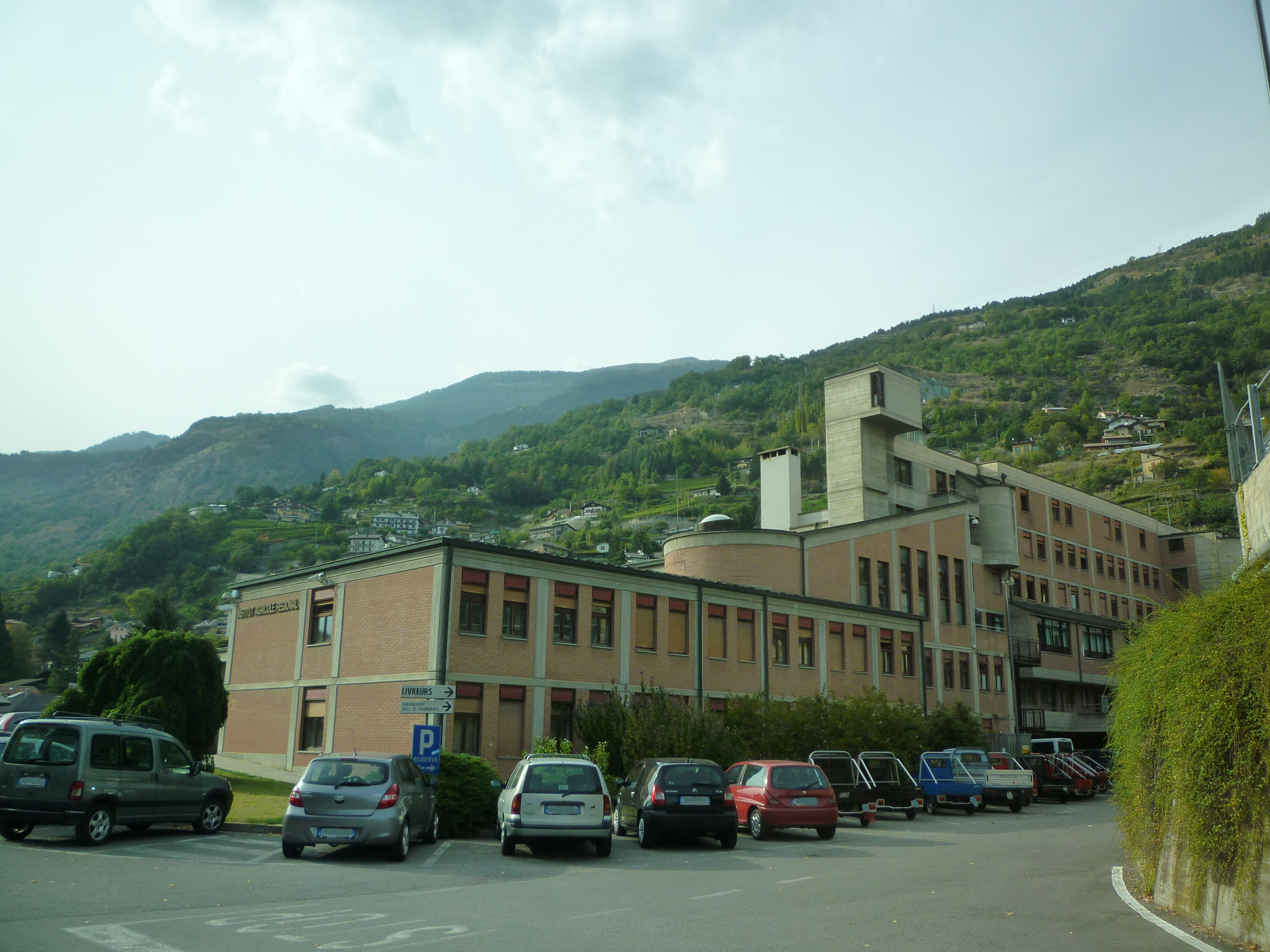 Institut agricole régional (IAR) d'Aoste